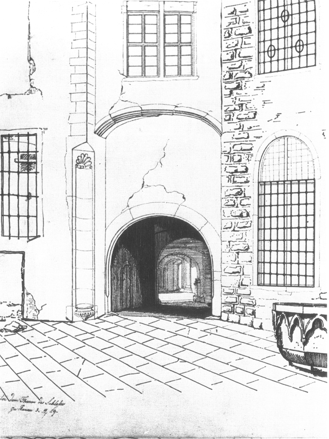 Im inneren Hof des alten Schlosses von Hanau. Federzeichnung, bezeichnet links unten "Hinter dem Thurm des Schlosses zu Hanau". Blick im inneren Hof des Stadtschloss Hanau nach Westen. Links Bossenquaderwerk des sechseckigen Bergfrieds, rechts ragt ein gotischer Taufstein ins Bild (Standort nähe Martinskapelle).